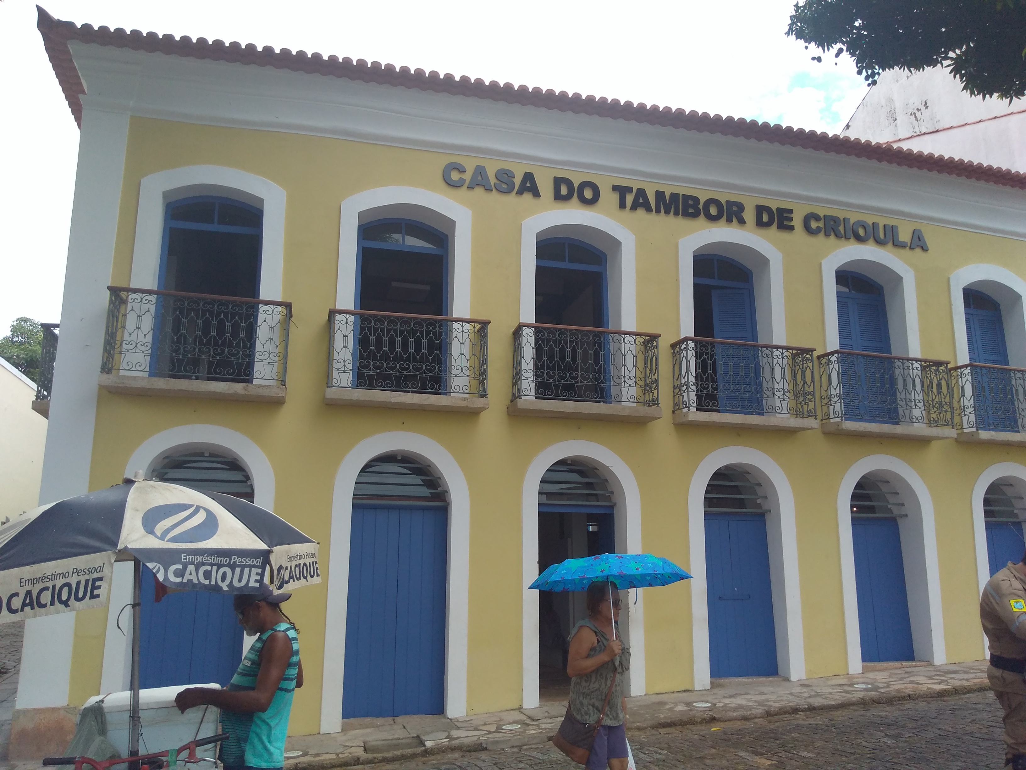 Parte exterior e exposições da Casa do Tambor de Crioula, espaço cultural destinado à preservação memória das manifestações populares de origem afro-brasileiras da cidade São Luís, MA